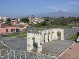 Parco comunale e sullo sfondo l'Etna